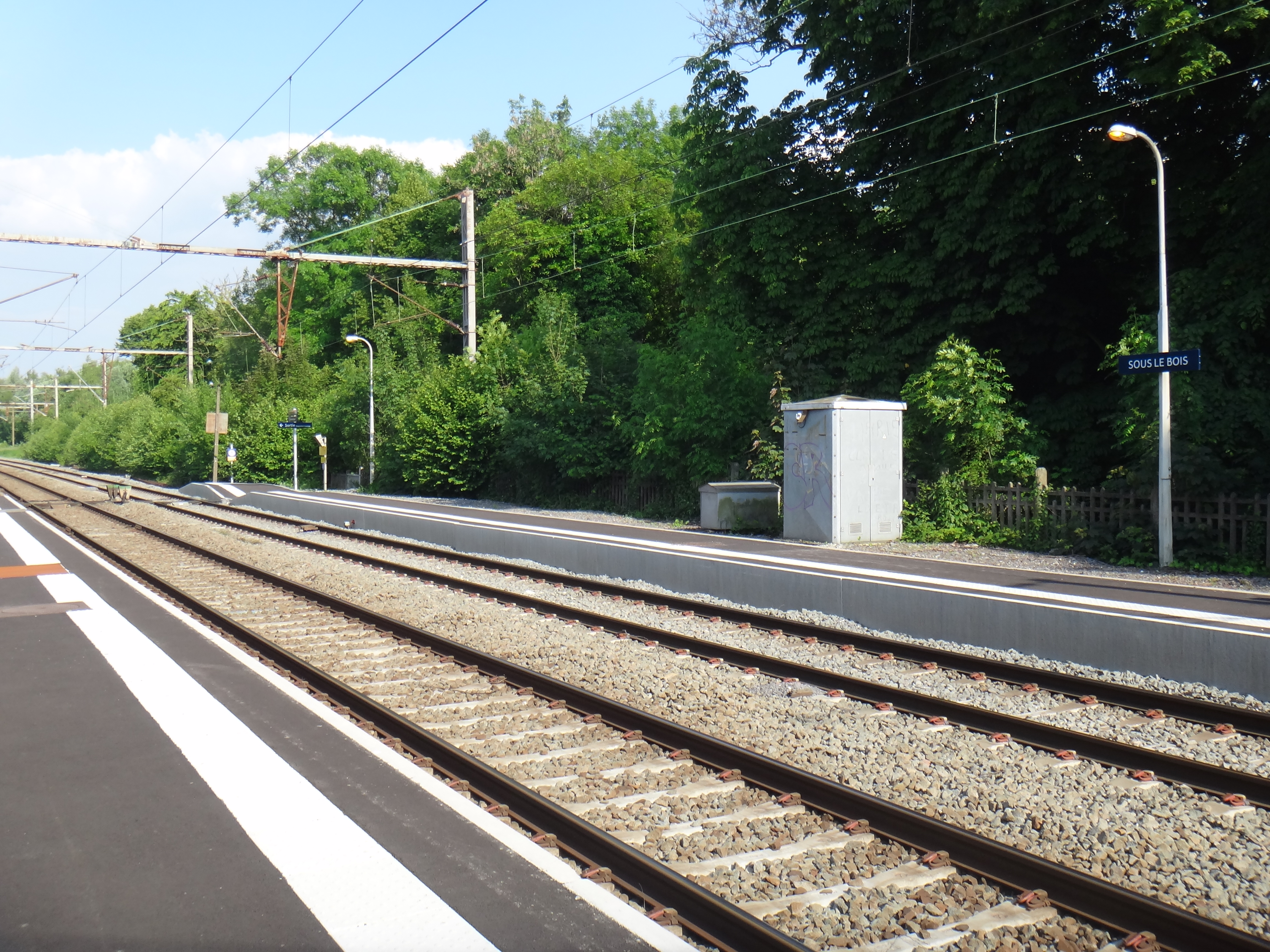 Quais de la gare de Sous-le-Bois, Nord, France, en 2014.